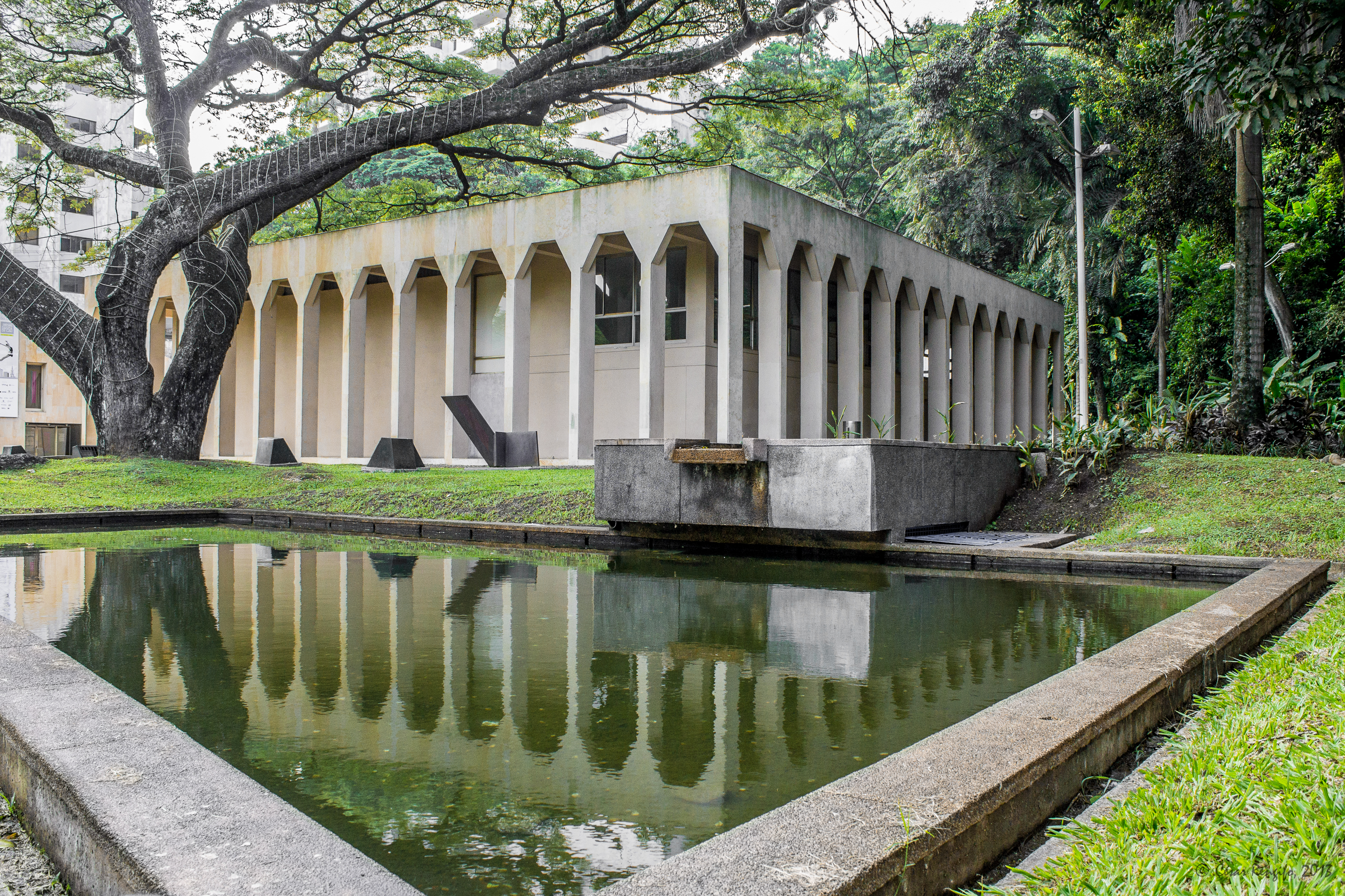 Museo de Arte Moderno La Tertulia, Cali